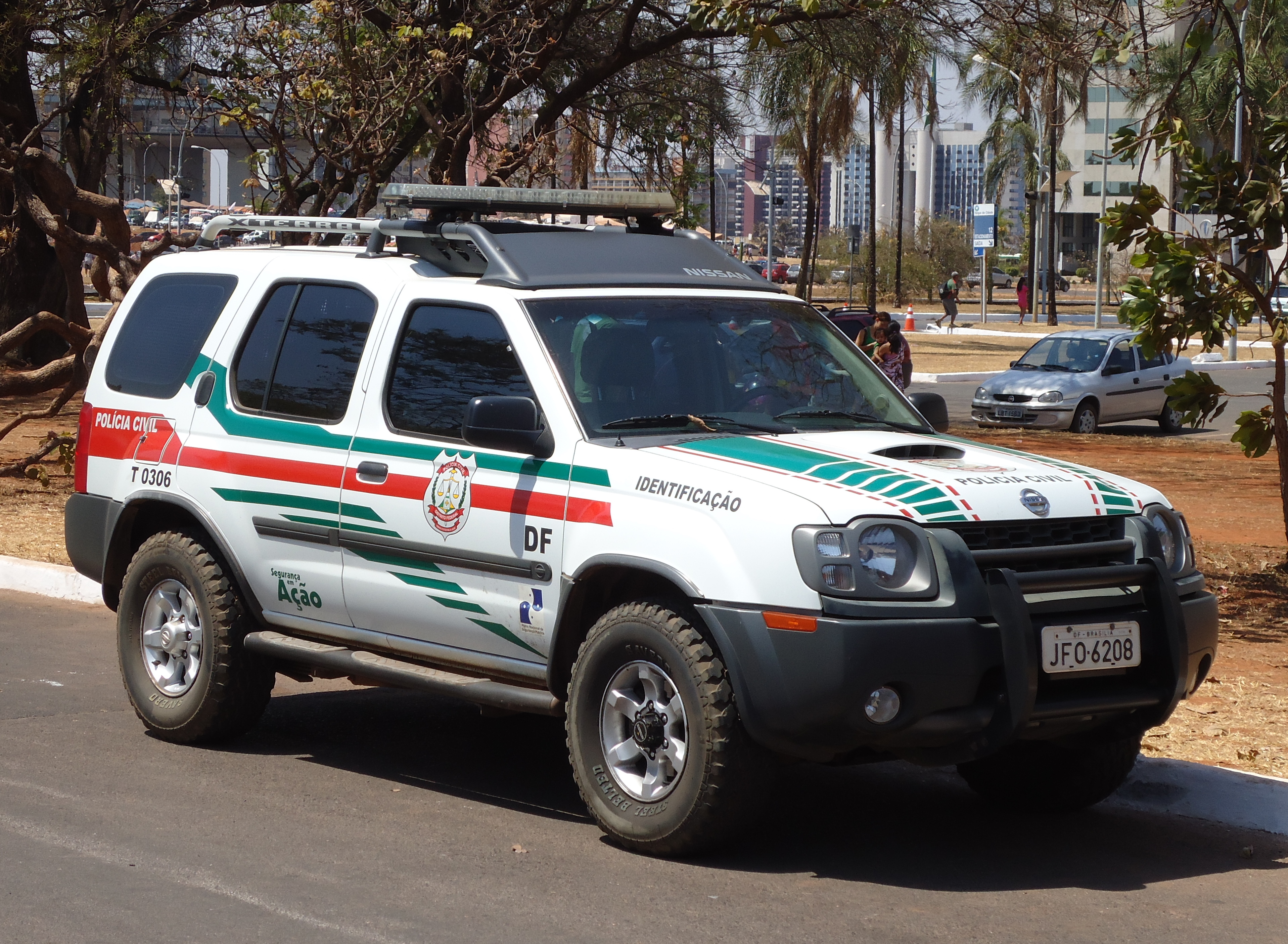 Viatura do Instituto de Identificação da Polícia Civil do Distrito Federal